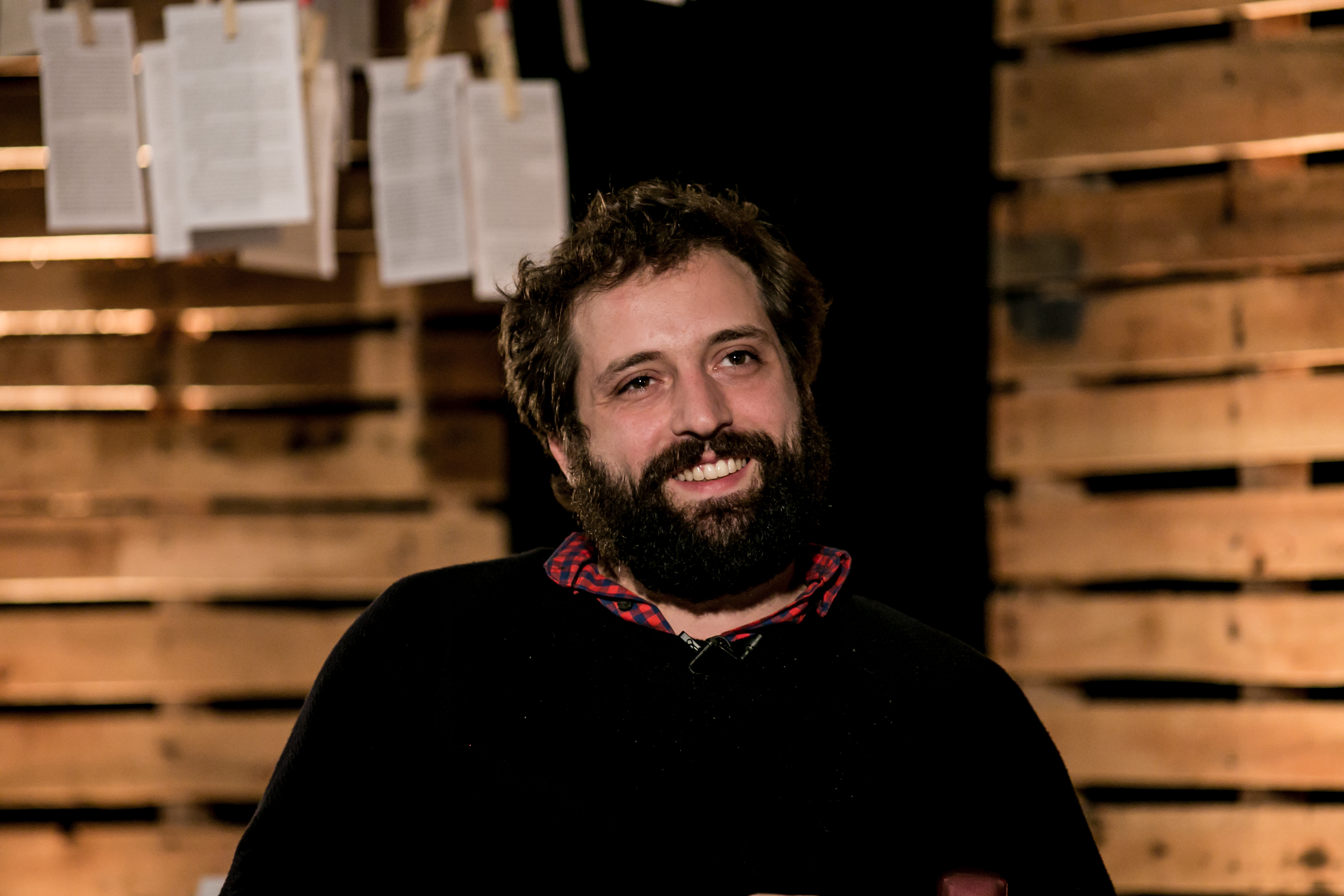 VOCÊ É O QUE LÊ A Noarr Cultura e Conteúdo, em parceria com a Livraria Cultura, promoveu a segunda edição do evento “Você é o que lê”, bate-papo com os autores Gregório Duvivier, Maria Ribeiro e Xico Sá. Representando a atual cena literária, jornalística, artística e cultural brasileira, o trio conduziu com bom humor uma conversa com o público sobre o mundo da leitura como espelho do mundo contemporâneo. “O leitor da política e do futebol são muito parecidos, pela passionalidade”, afirma Xico Sá durante o evento “Você é o que Lê” em Brasília, Xico também afirmou: “A nossa falta é de leitura, não de grandes autores. “As pessoas não entendem o que elas leem, é um problema de interpretação de texto”, disse Gregorio Duvivier que completa: “O problema no Brasil não é falta de informação. É a qualidade da informação”. Gregorio também fala sobre cultura: “Dizem que hoje temos cultura. Não temos. Porque cultura sem democracia não é cultura!” Quando o assunto é internet e discursos de ódio, Maria Ribeiro discorre: “As pessoas mais agressivas nas redes são as que tem perfil ‘do bem’: mãe de família, cristã”. Fotos: Mídia NINJA (CC BY-SA 4.0)